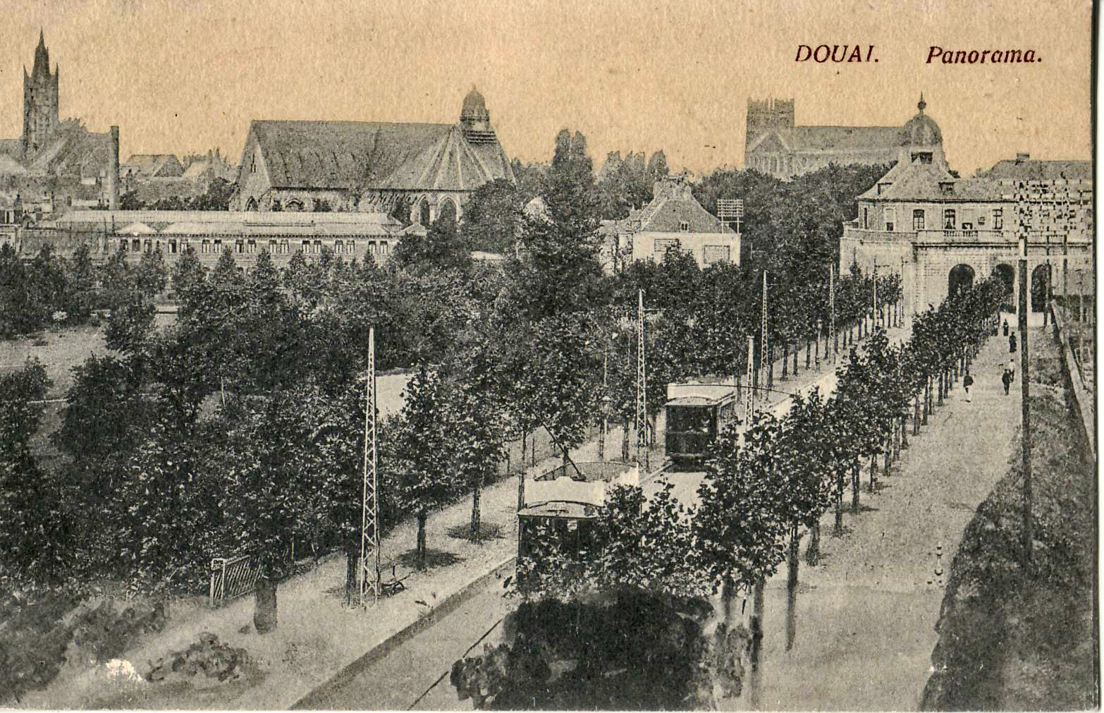 Carte postale ancienne sans mention d'éditeur : DOUAI - Panorama